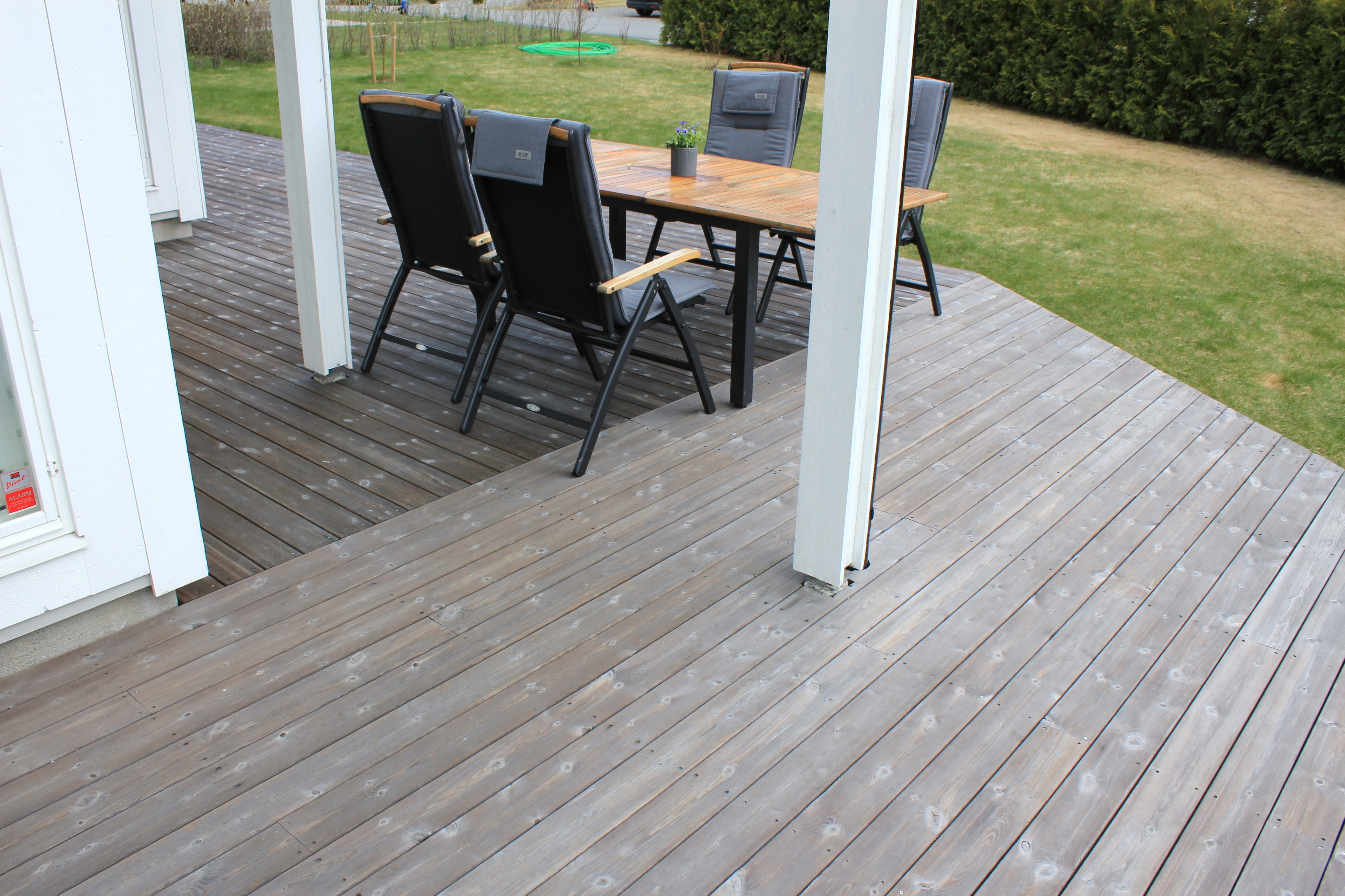 Kebony terrassebord i furu